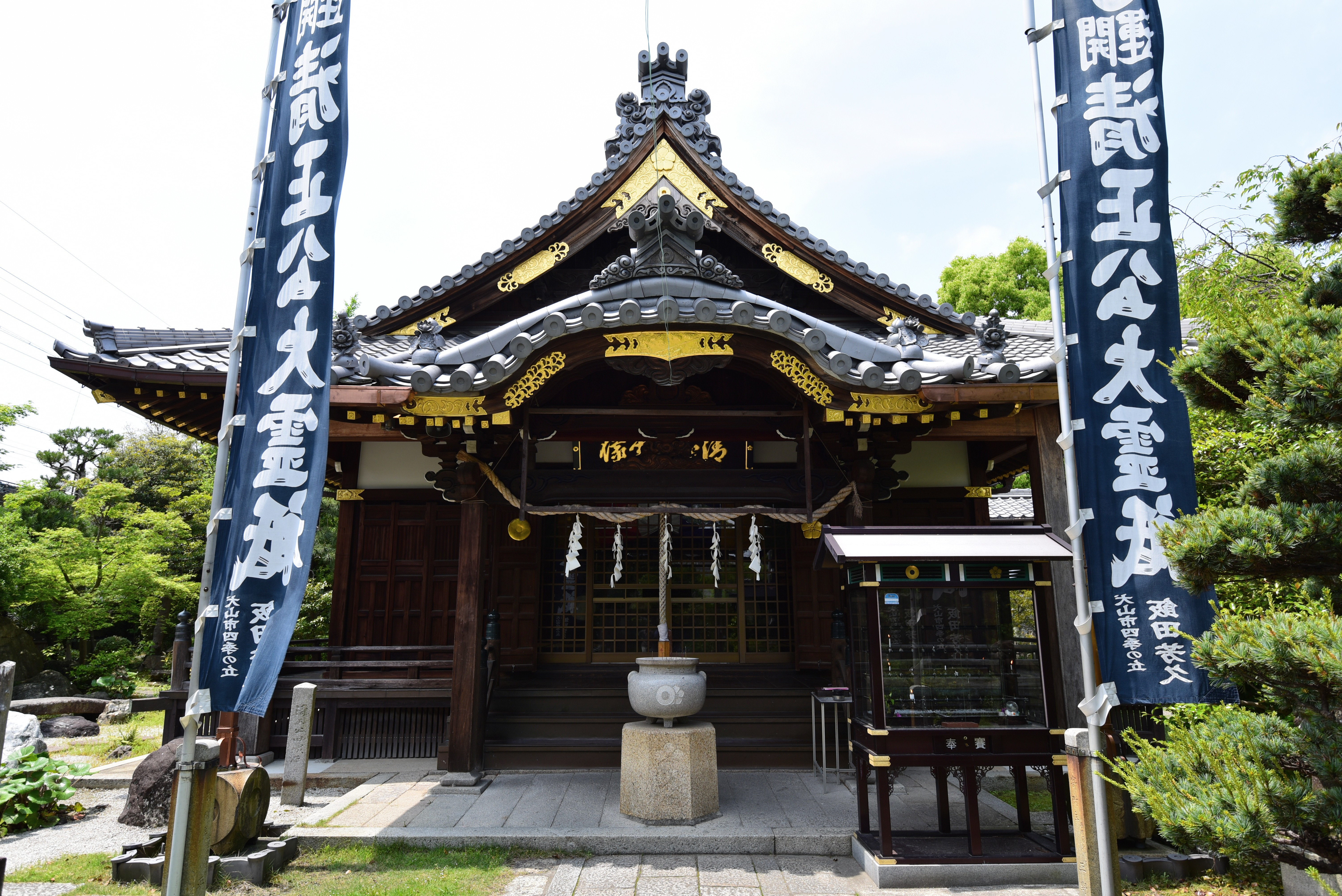 妙行寺の清正公堂